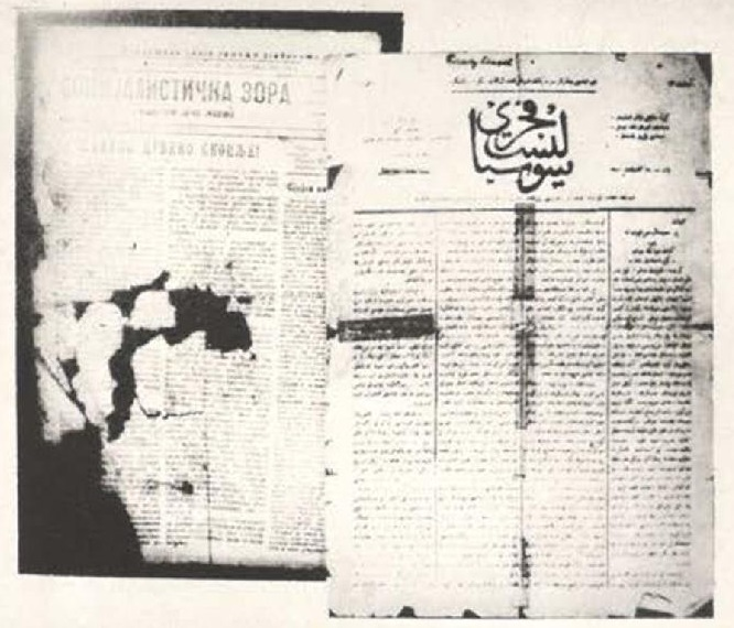 Главата на вестник "Социјалистичка_Зора".